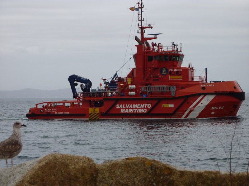 Remolcador